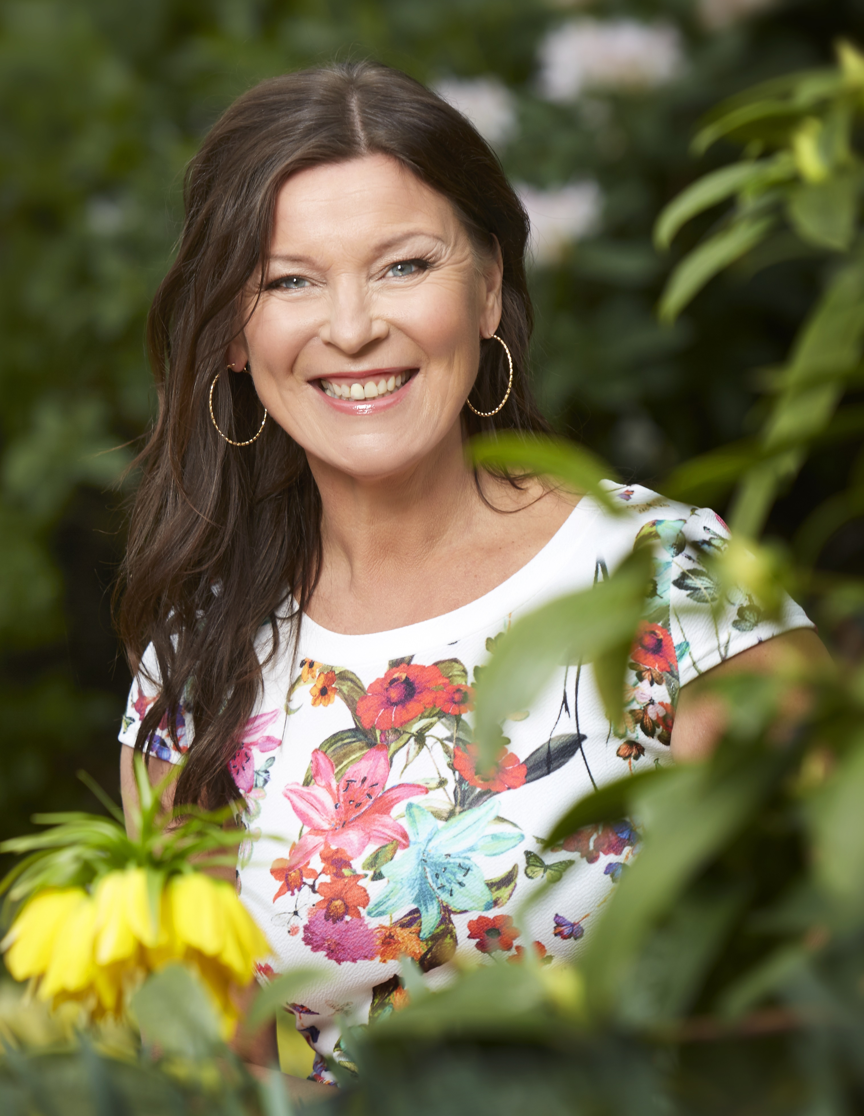 Artisten Lotta Engberg.